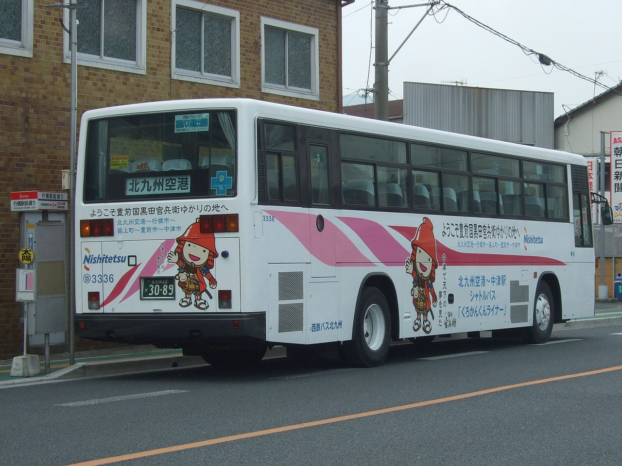 Nishitetsu bus “Kurokankun Liner” 西鉄バス 北九州空港 - 中津間バス「くろかんくんライナー」